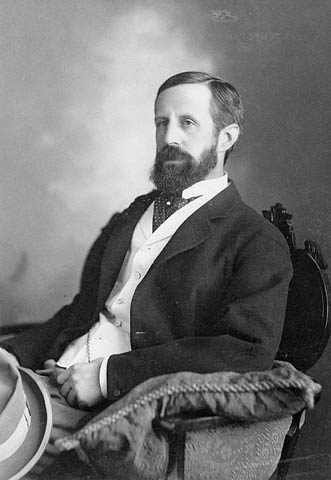 His Excellency Lord Aberdeen